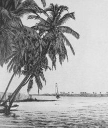 Paisaje del lago de Maracaibo en el siglo XIX, dibujado por el editor y periodista Eduardo López Rivas.